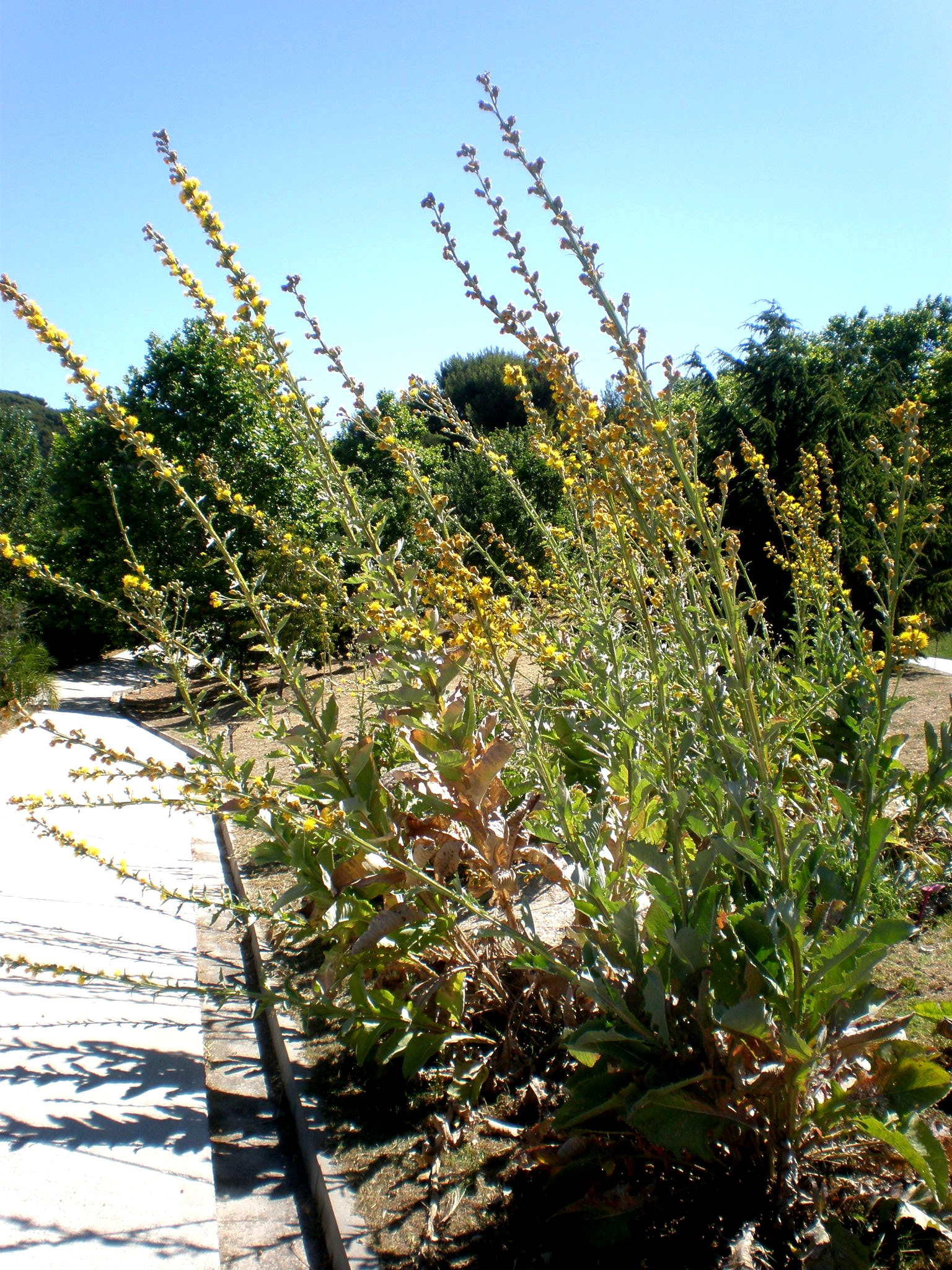 Centaurea babylonica - Jardín Botánico de Barcelona.